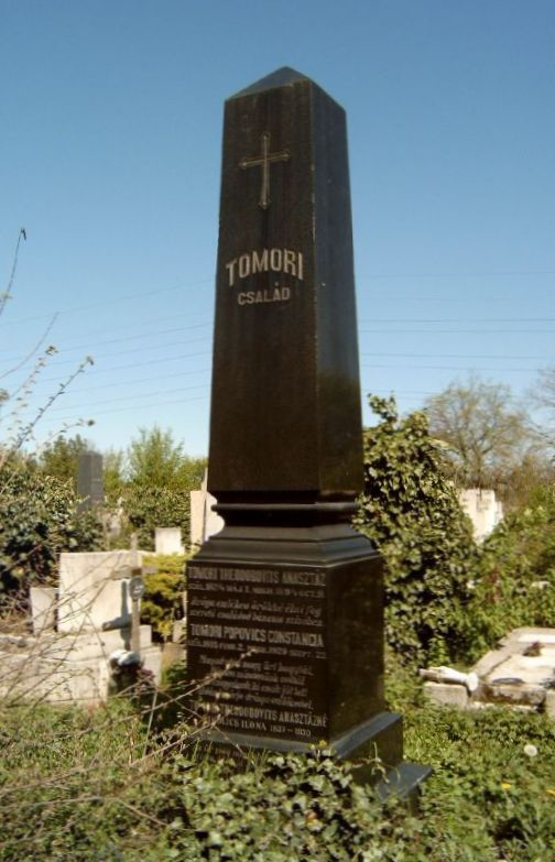 Tomori Anasztáz, Theodorovits (Dunaföldvár, 1824. május 1. – Budapest, 1894. október 8.) mérnök, a magyar tudományos és művészeti élet mecénásának és családjának sírja Budapesten. Új köztemető: 16/4-1-39/40.